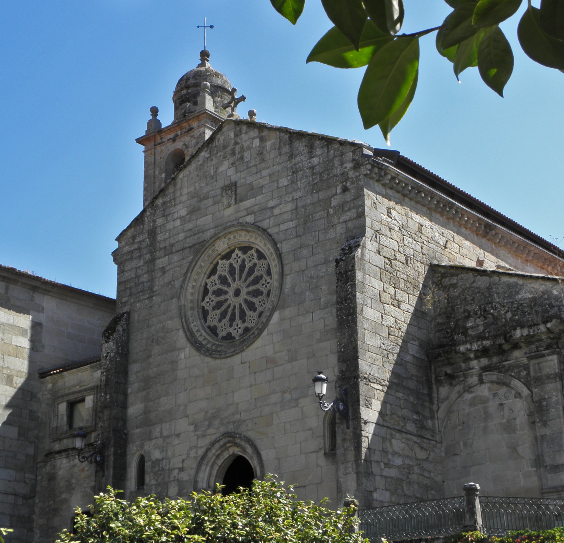 Convento de San Francisco, Pontevedra